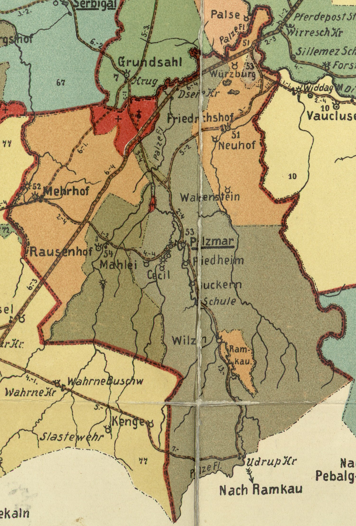 Palsmane kihelkonna mõisad 1904. aasta kaardil.